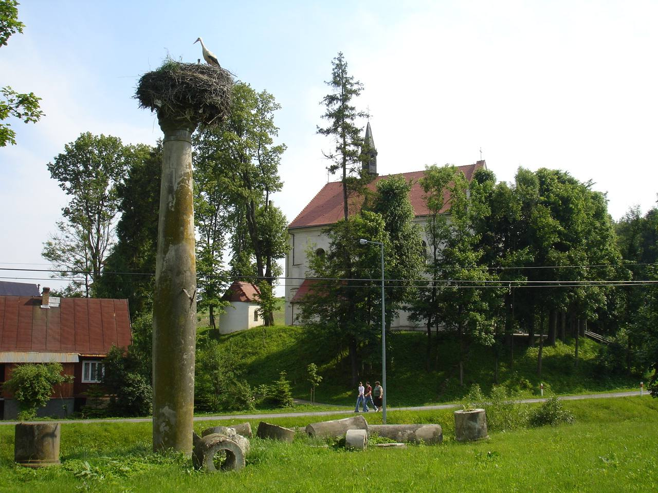 pozostałości spalonego przez bandy UPA dworu Wiktorów